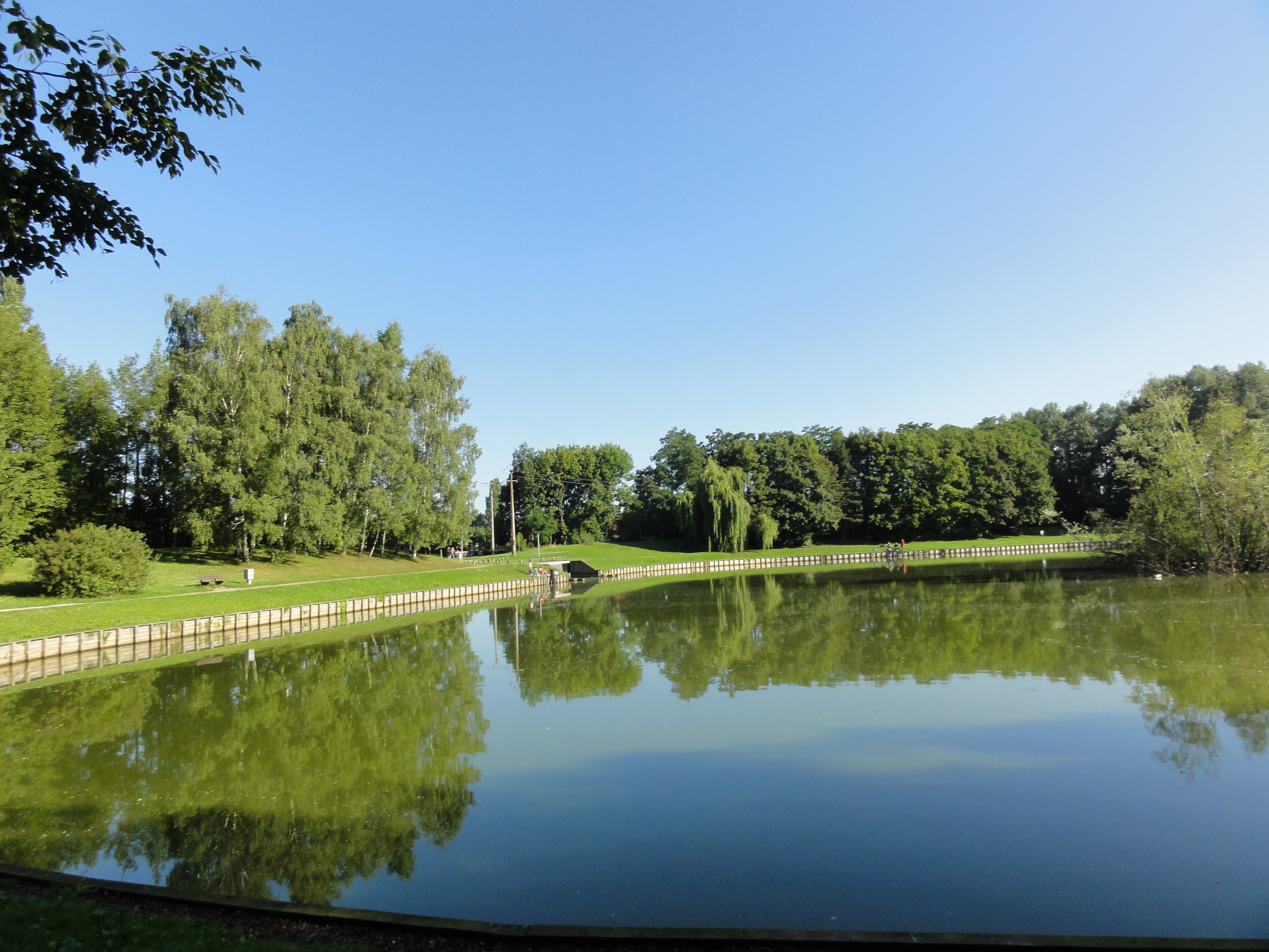 Terril n° 130A dit Pas de la Ville Ouest, Fosse n° 6 de la Compagnie des mines de l'Escarpelle, Leforest, Pas-de-Calais, Nord-Pas-de-Calais, France.